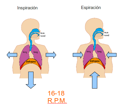 Diagrama de como actúan los músculos intercostales y el diafragma aumentando el volumen del pulmón en la inspiración y disminuyéndolo en la espiración.